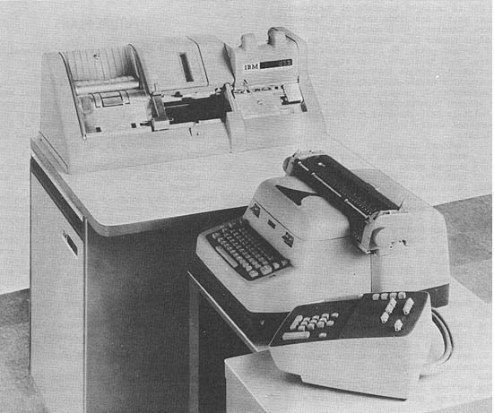 IBM 632